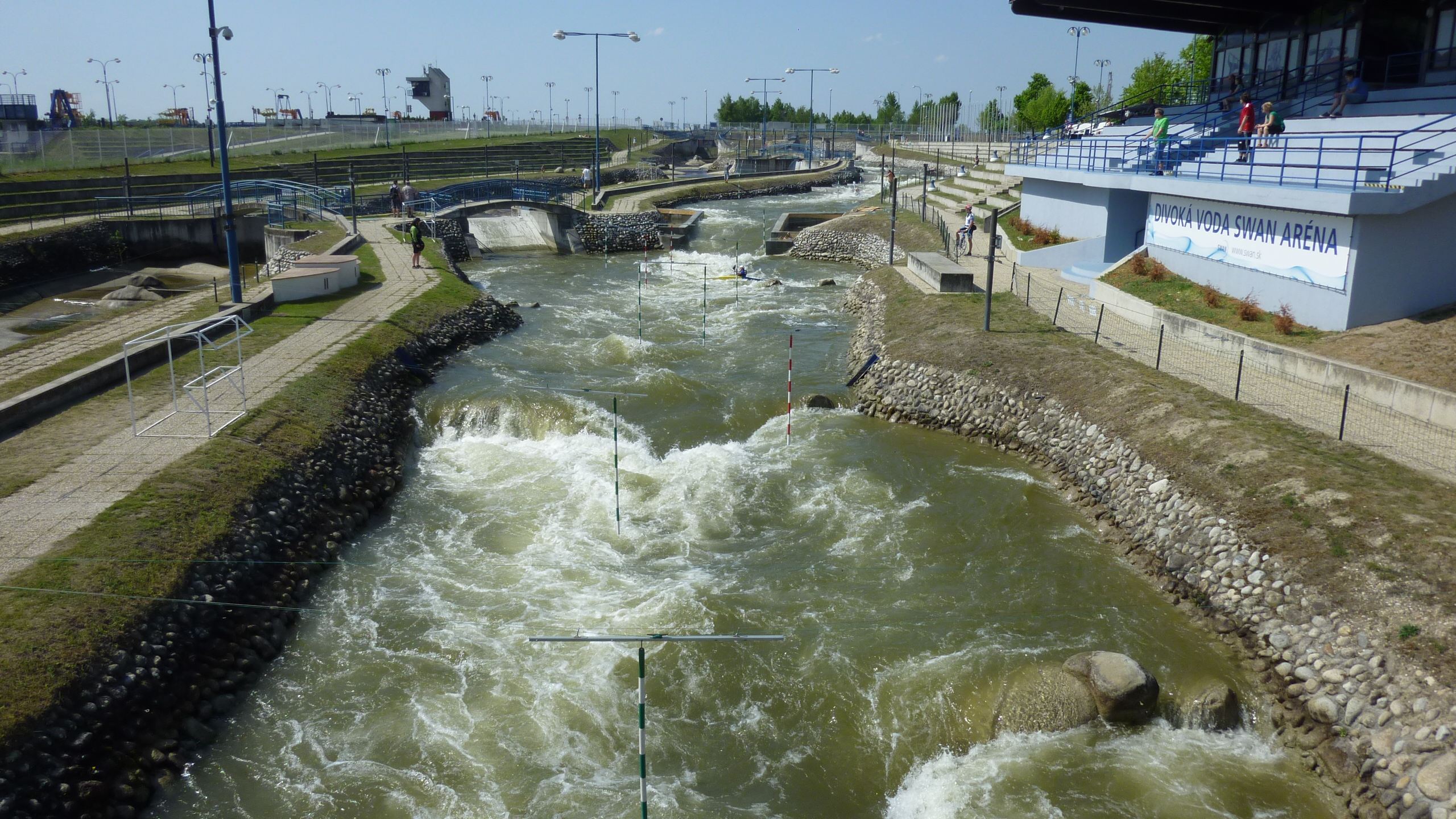 DIVOKÁ VODA - SWAN ARÉNA